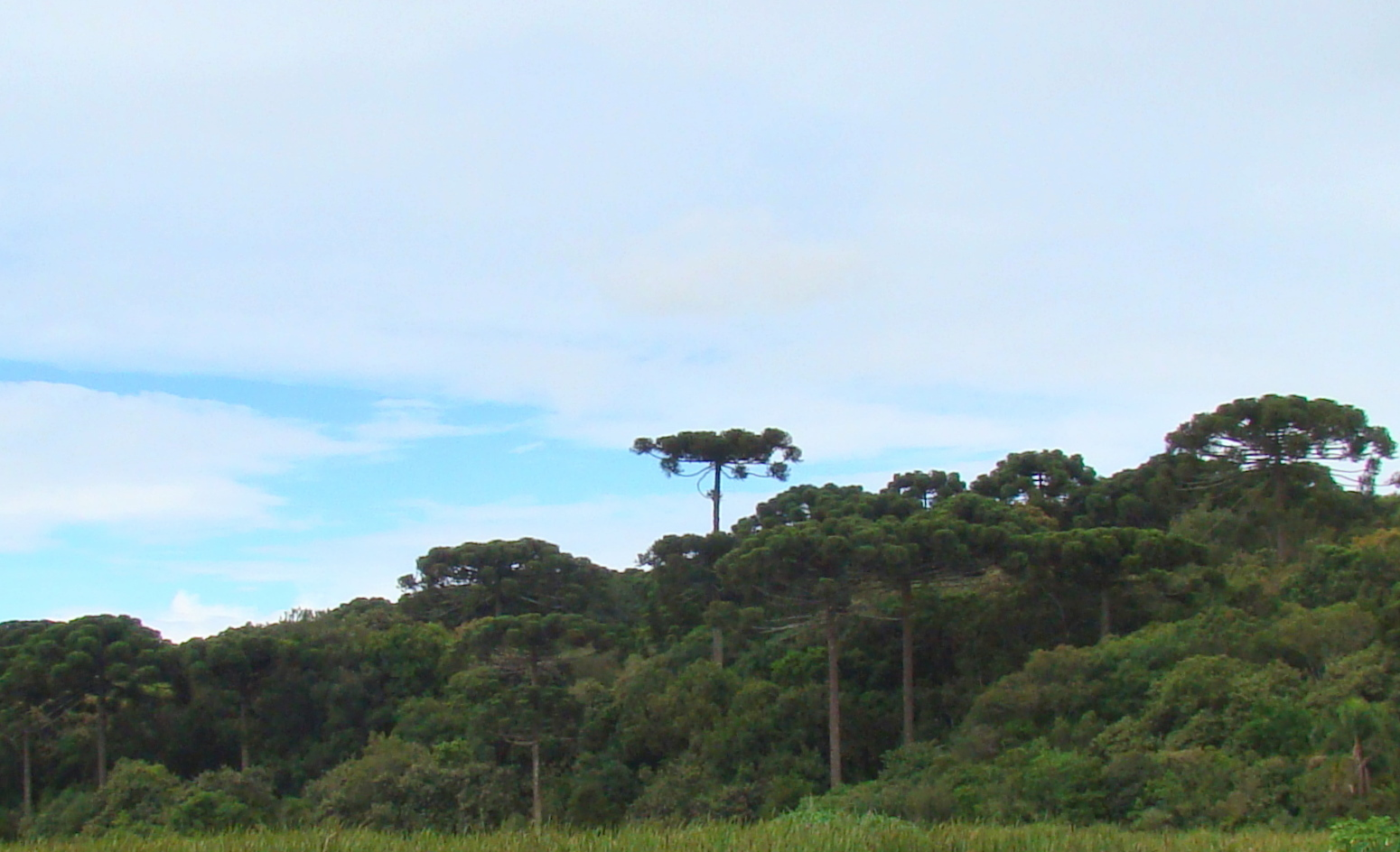 Remanescente da mata das araucárias em Piraquara (Grande Curitiba), Paraná, Sul do Brasil.